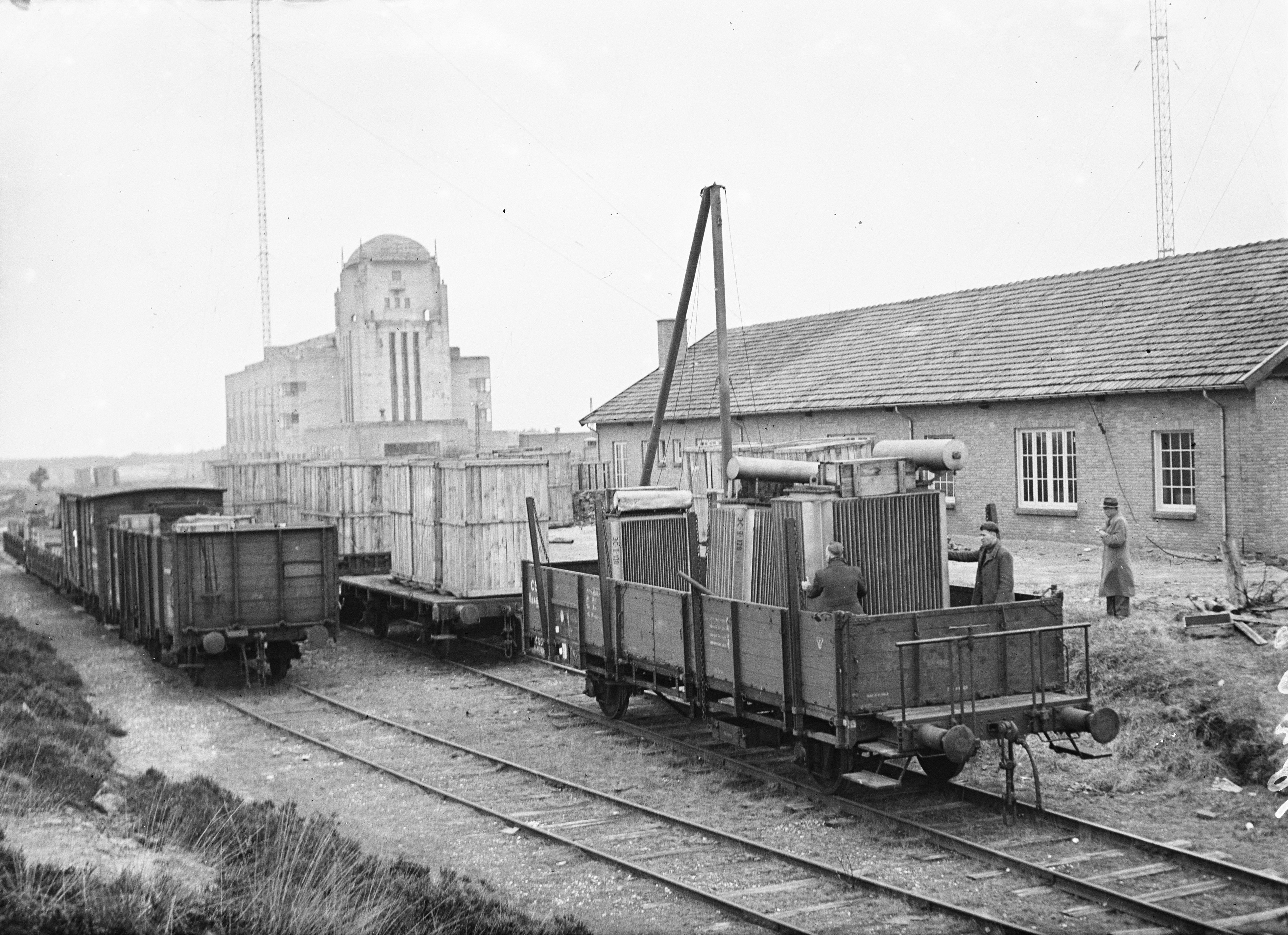 Collectie / Archief : Fotocollectie Anefo Reportage / Serie : [ onbekend ] Beschrijving : Door de Nederlandse autoriteiten, die belast zijn met de opsporing van door de Duitsers uit Nederland weggevoerde materialen, is in de Russische zone van Duitsland, de volledige zenderinstallatie van de zender Kootwijk teruggevonden. Veertien wagons met materiaal zijn heden in Kootwijk teruggekeerd. De losplaats op het terrein van Radio Kootwijk Datum : 3 april 1947 Locatie : Kootwijk Trefwoorden : radio, recuperaties, spoorwegen, tweede wereldoorlog, wagons, zendinstallaties Fotograaf : Sagers, Harry / Anefo Auteursrechthebbende : Nationaal Archief Materiaalsoort : Glasnegatief Nummer archiefinventaris : bekijk toegang 2.24.01.09 Bestanddeelnummer : 902-0981